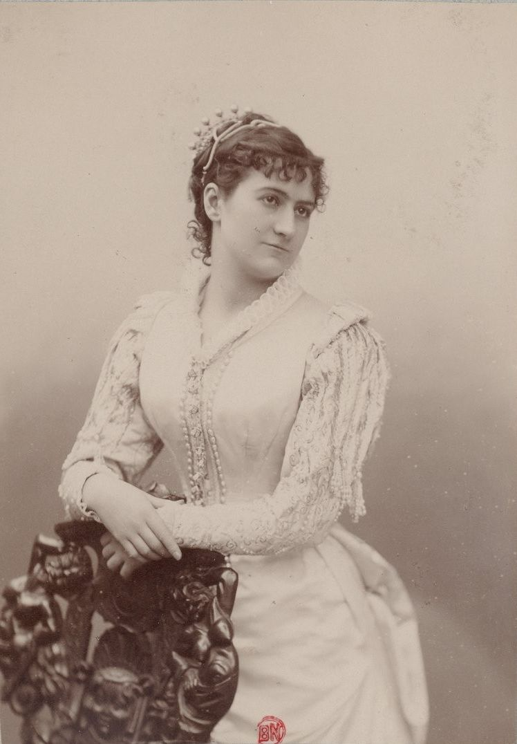 Cécile Mézeray, Opéra-Comique, photographie, tirage de démonstration Atelier Nadar